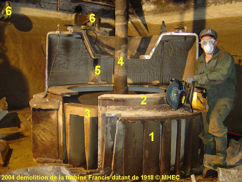 Turbine Francis de type "SINGRUN" datant de 1918 Turbine_SINGRUN.jpg